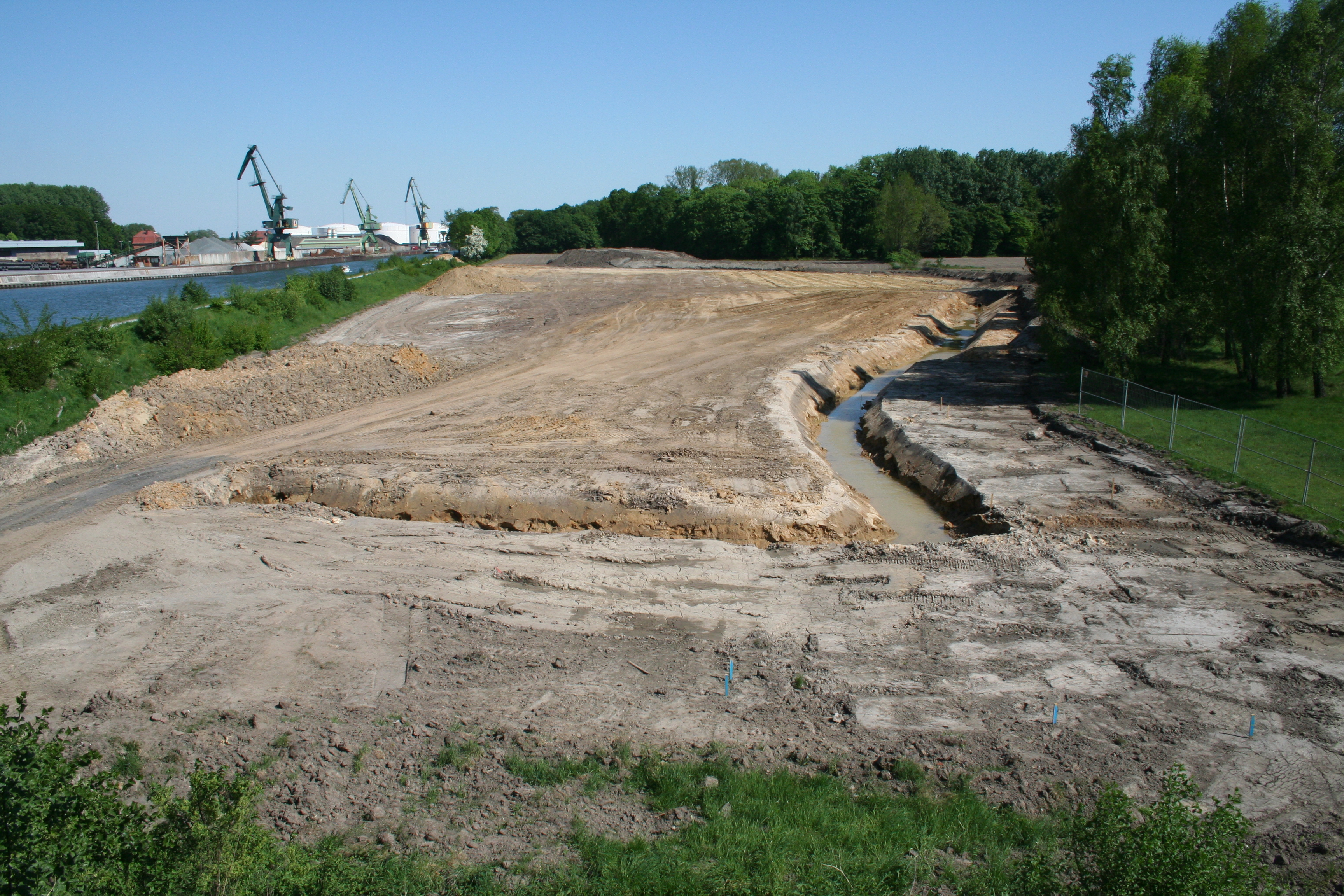 Bauarbeiten zur Erweiterung des Hafenbecken Stadthafen Lünen 11.05.2008